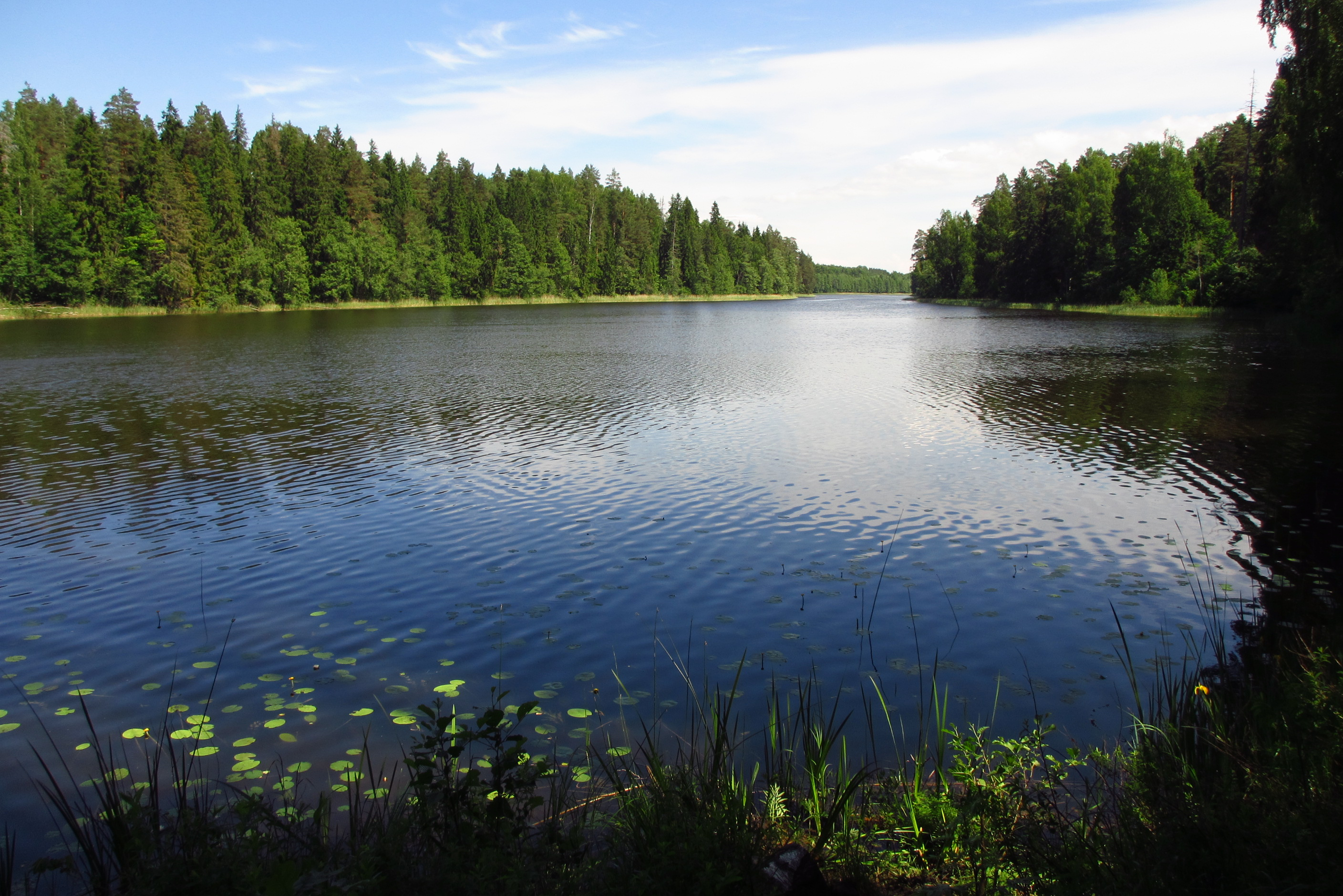 Karula Pikkjärv Pikkjärve MKA-l